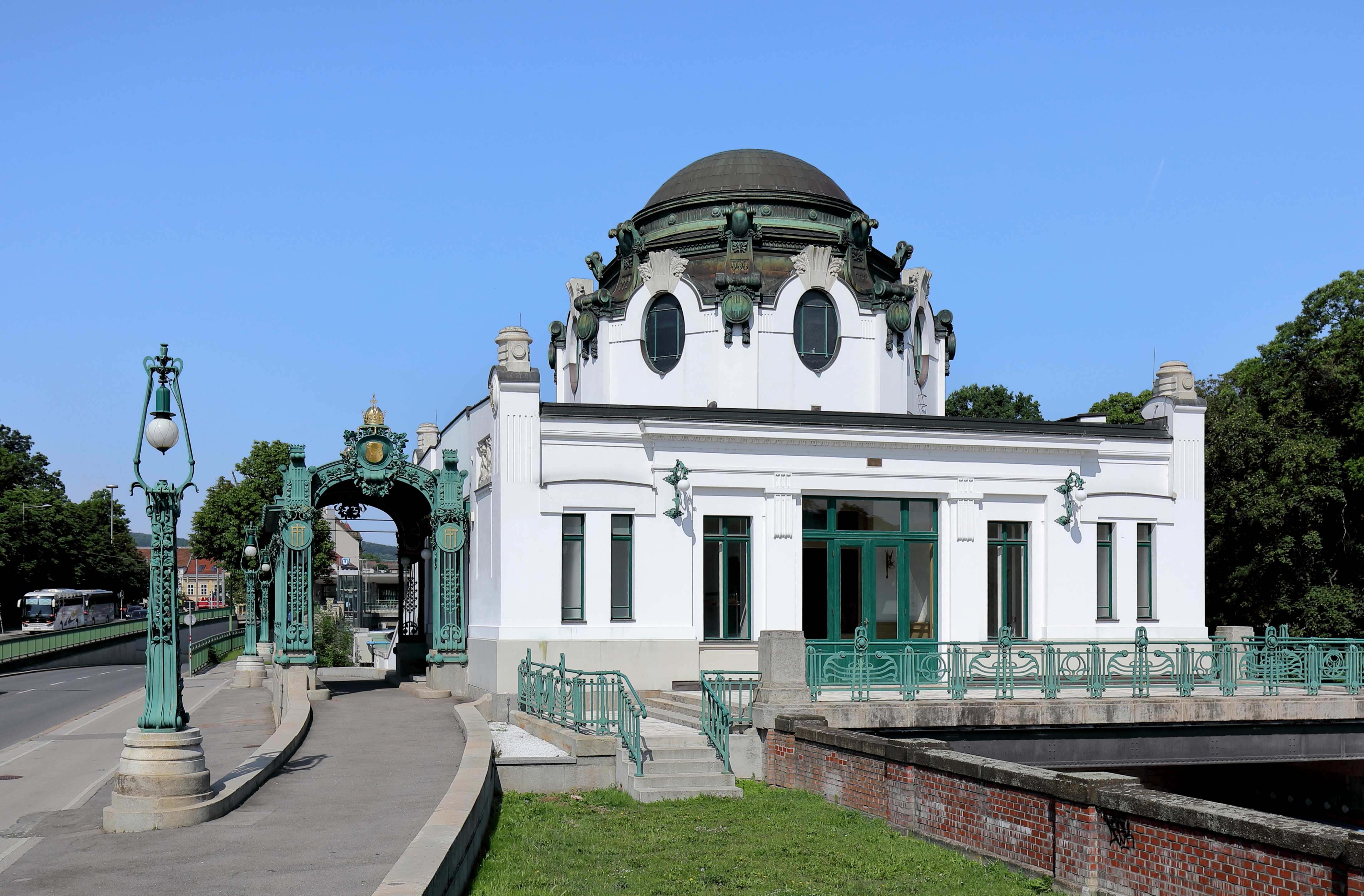 Der Hofpavillon Hietzing im 13. Wiener Gemeindebezirk Hietzing.Der sogenannte Hofpavillon von Otto Wagner war einst ein separates Aufnahmegebäude der Wiener Stadtbahn für den Kaiser und sein Gefolge und ist heute eine Außenstelle des Wien Museums. Er befindet sich knapp 150 Meter flussabwärts der Kennedybrücke bzw. der U-Bahn-Station Hietzing.